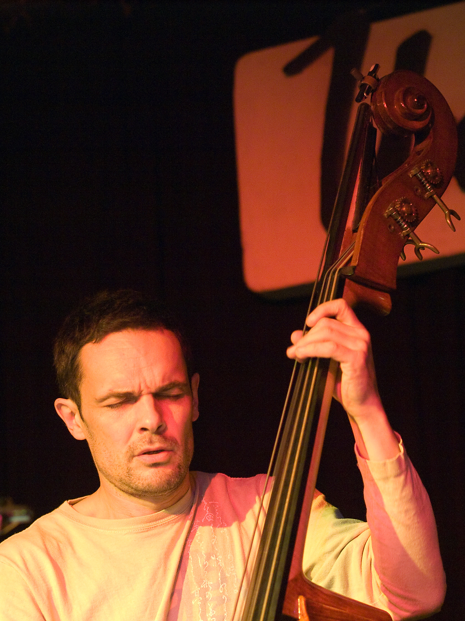 Bänz Oester, jazz bassist, picture taken in Jazz club "Unterfahrt" in Munich/Germany